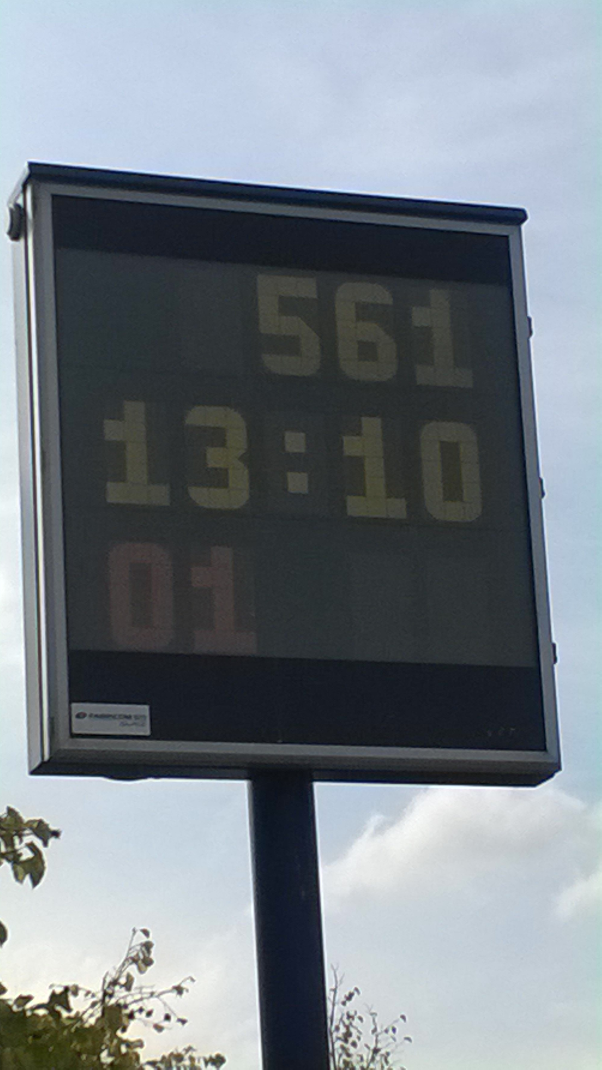 Een ARIbus-bord zorgt voor het verzekeren van de aansluitingen trein - bus